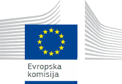 Logotip Evropske komisije.